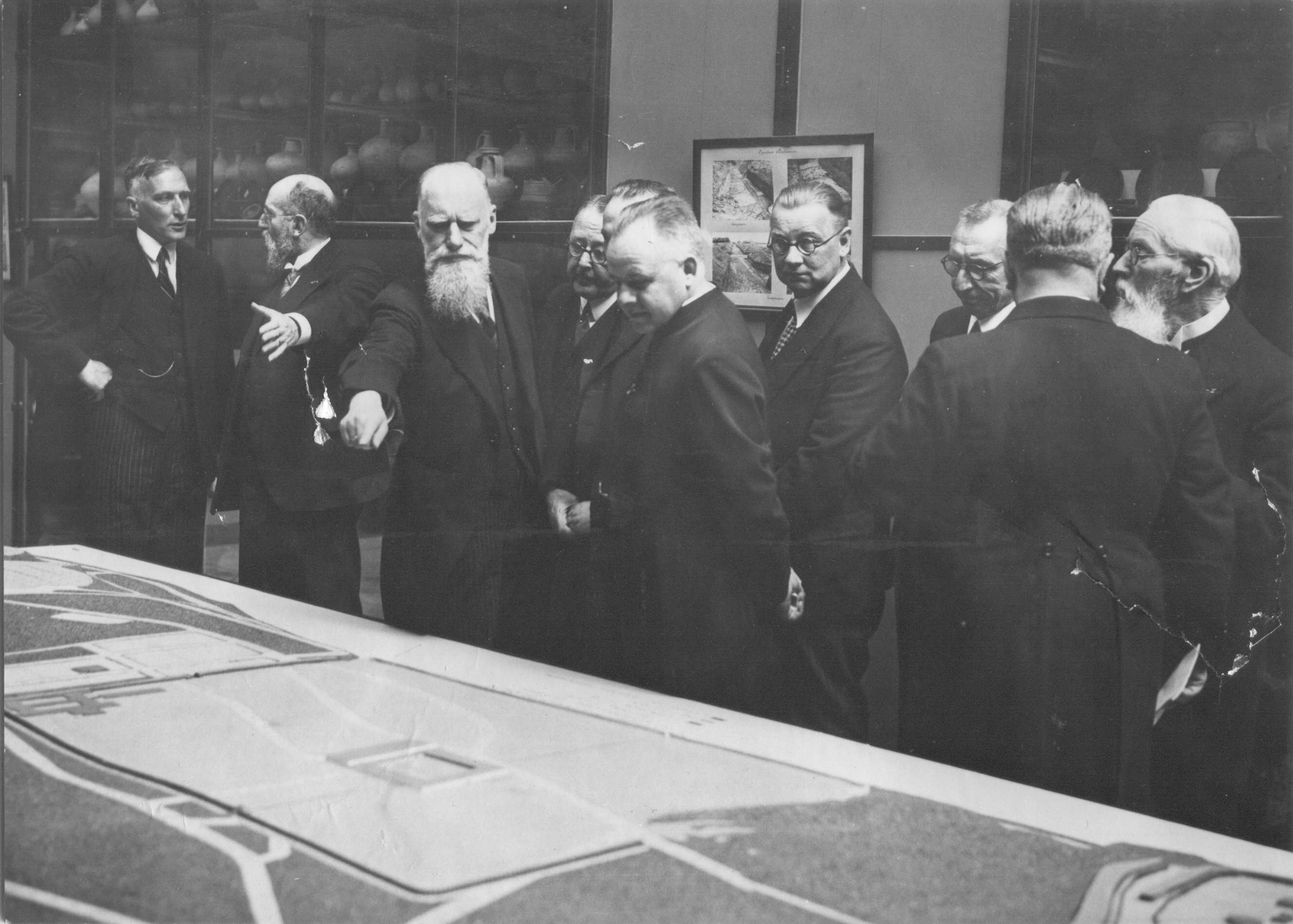 Heropening van Museum Kam